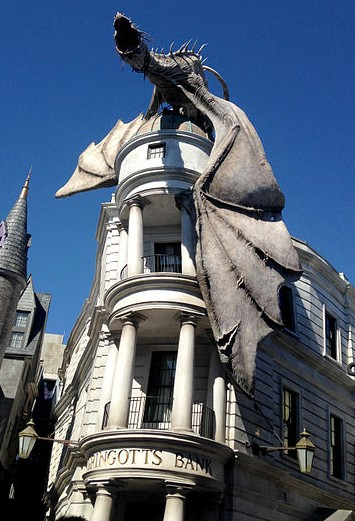 Harry Potter and the Escape from Gringotts (Universal Studios Florida)